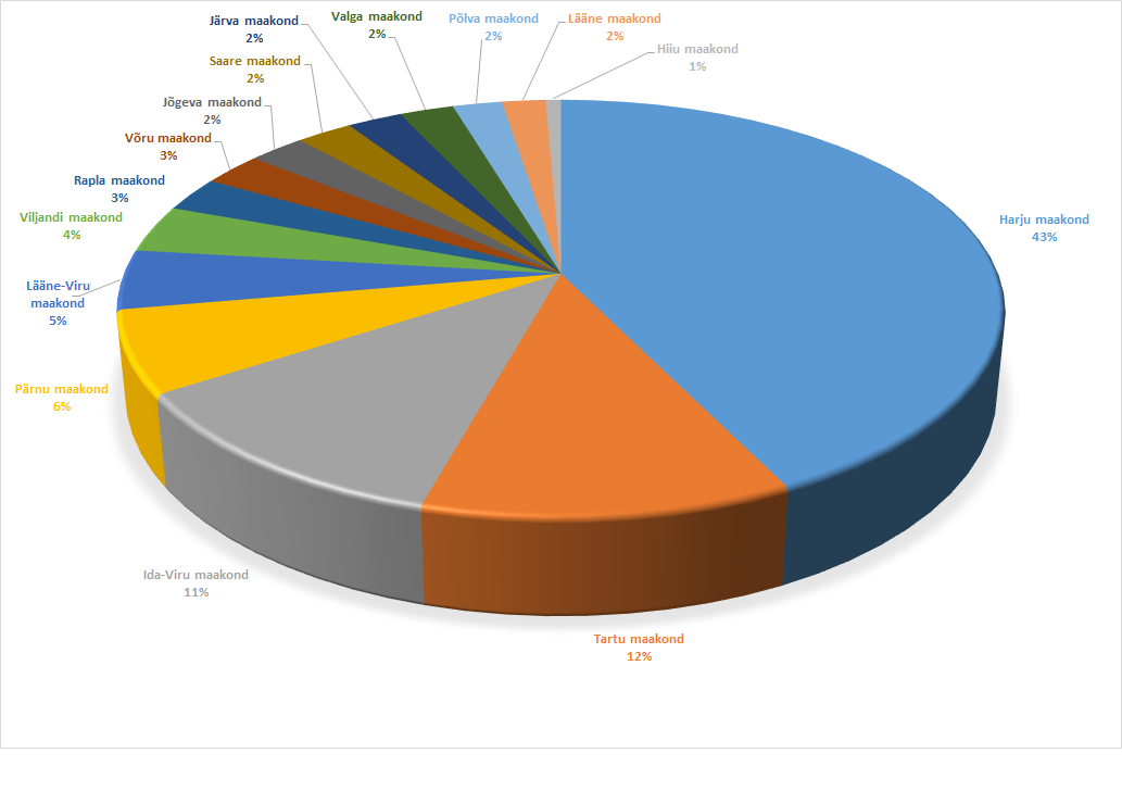 Eesti maakondade rahvastiku jaotumise diagramm